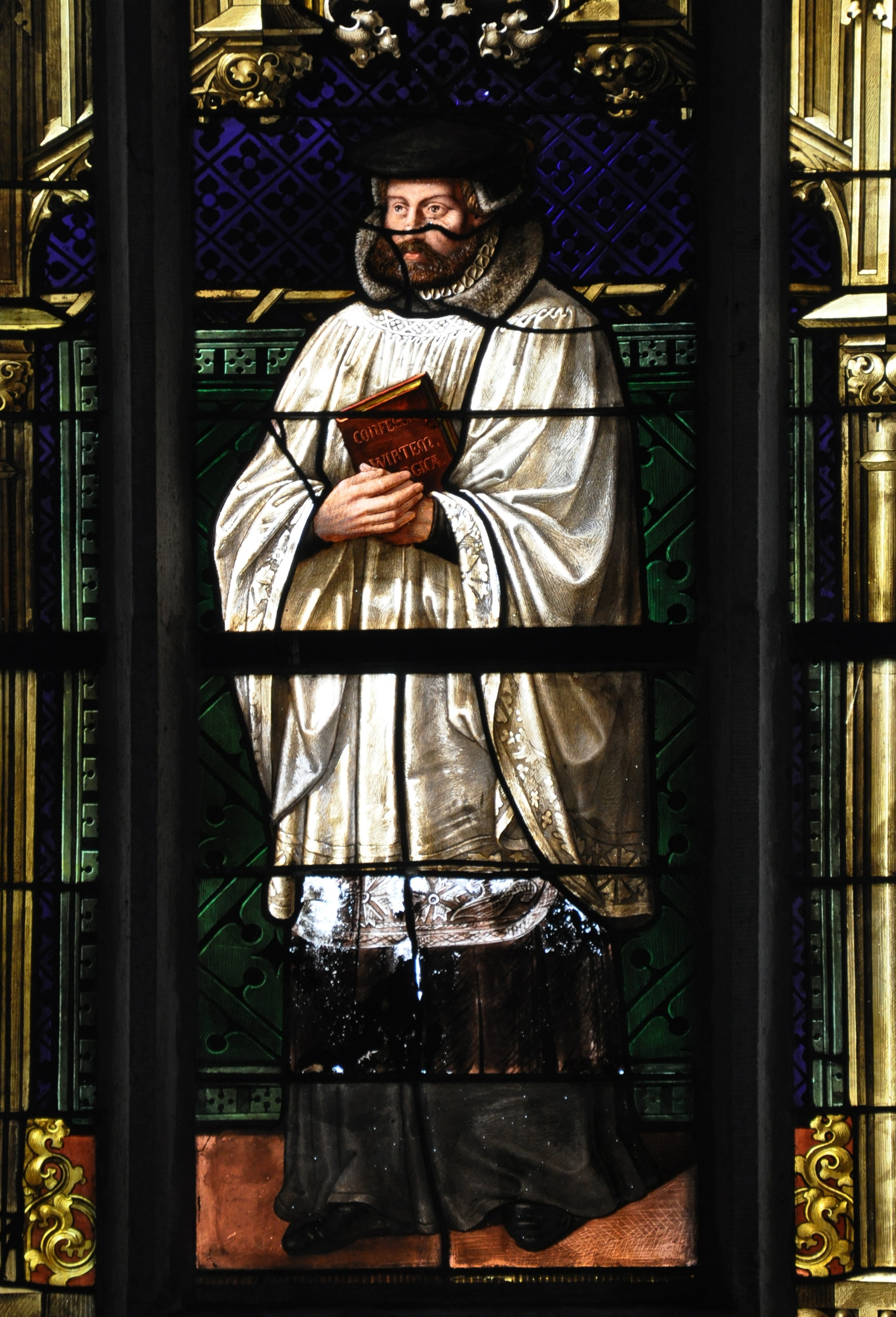 Evangelische Stadtkirche Ravensburg (ehem. Karmeliterkirche) Glasfenster des 19. Jahrhunderts: Johannes Brenz; Detail